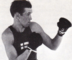 Antero Halonen